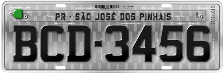 Placa veicular de passeio, nas dimensões e especificações atualizadas pela Resolução 372/2011 do Contran, na escala 1 cm = 37,8 px.